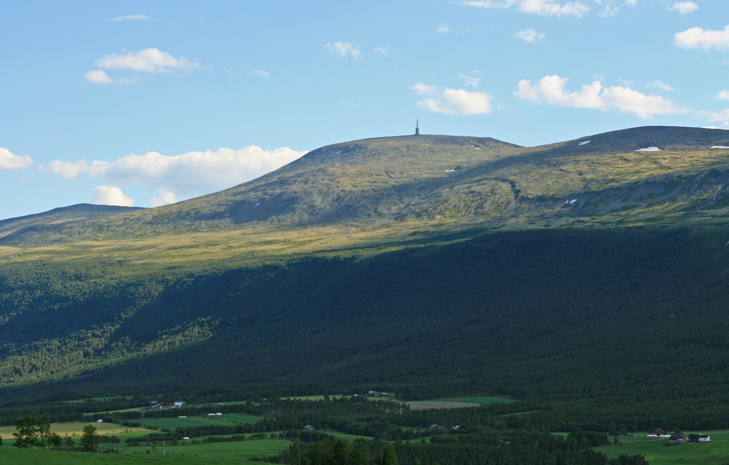 Jetta (Blåhø), Vågå/Dovre